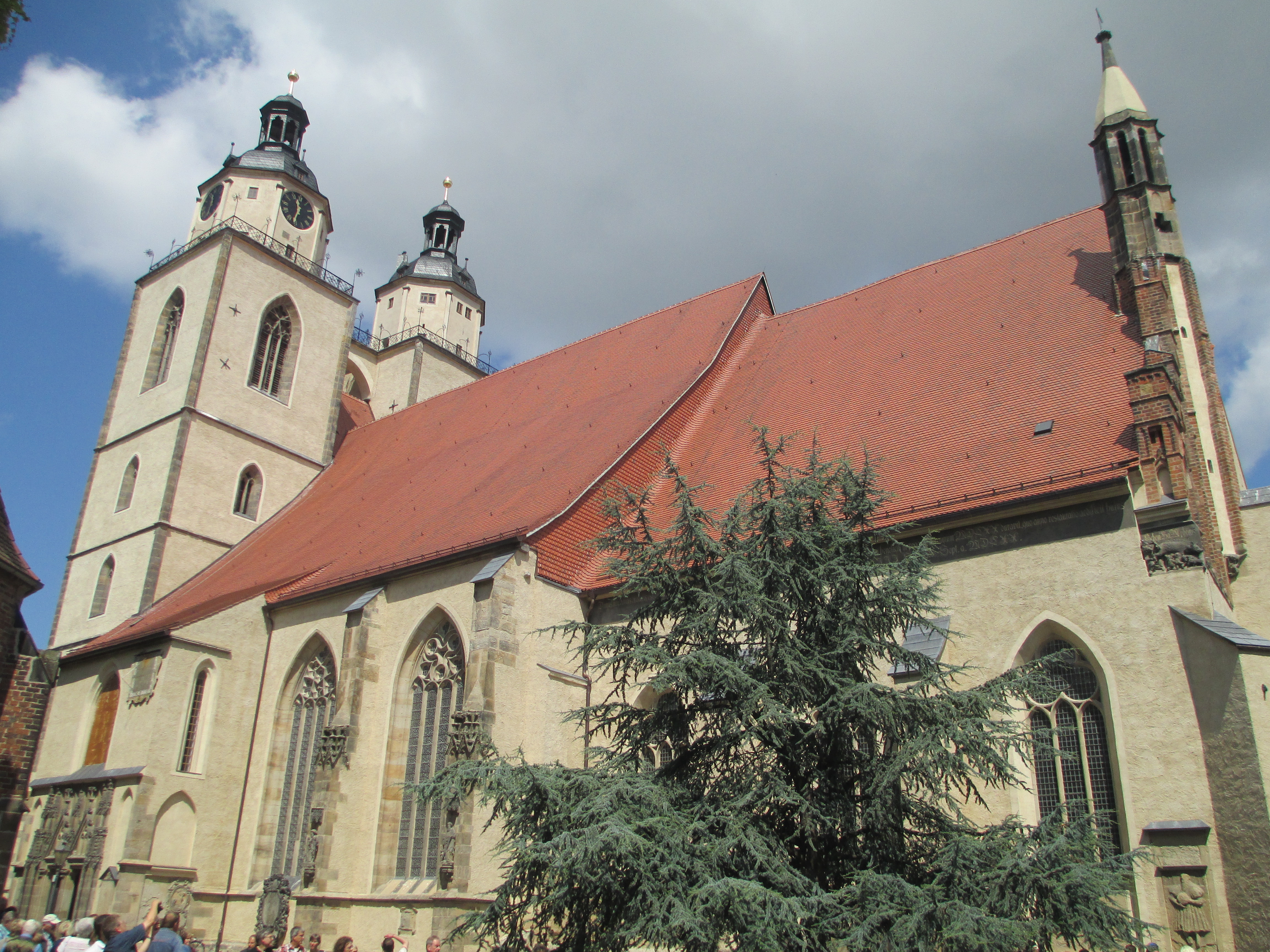 הכנסייה העירונית בויטנברג עם פסל חזירת היהודים